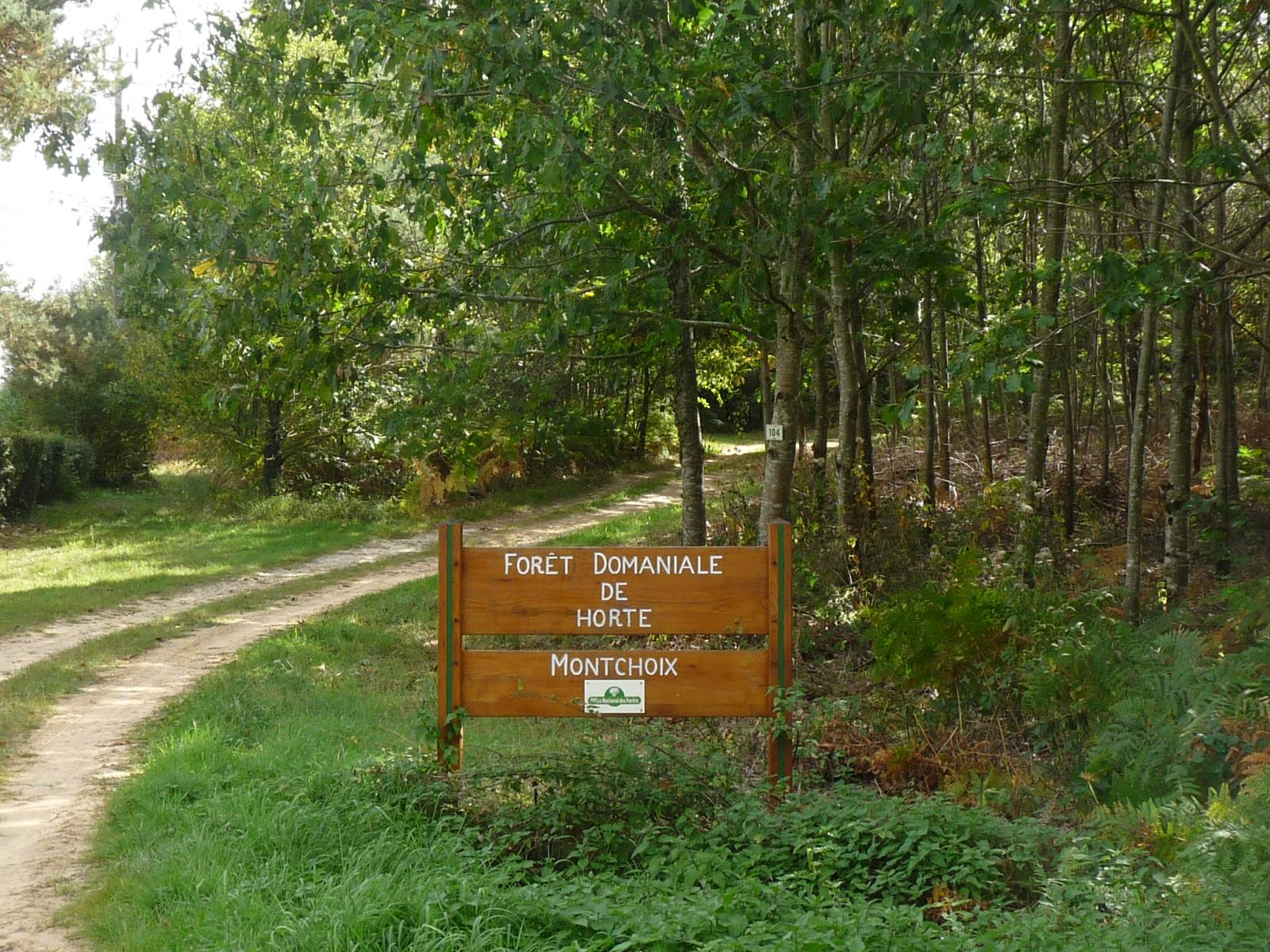 forêt d'Horte (entre Beaulieu, Dignac et la D.87), Charente, France